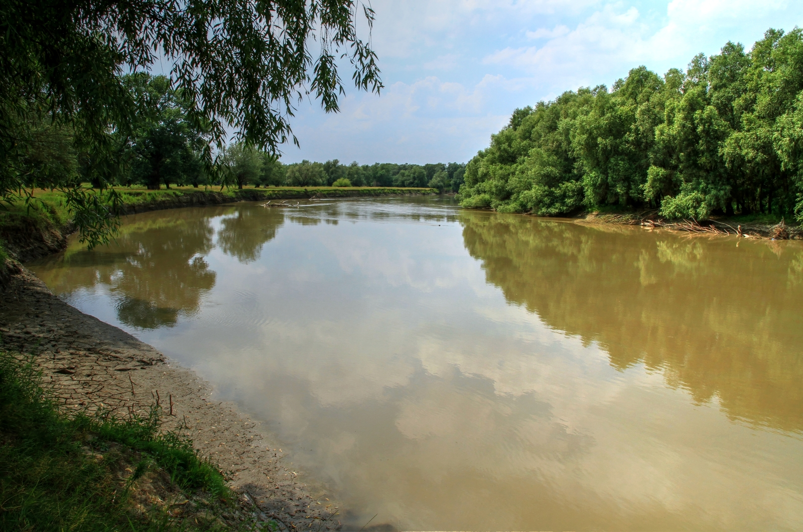 Прутул де Жос, монумент природы, находится в Кахулский район, с. Слобозия Маре (код MD-CH-rs-003)